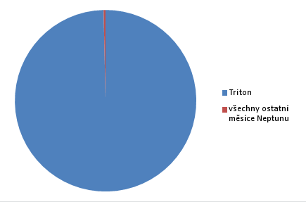 Representación de la masa de Tritón respecto a otras lunas